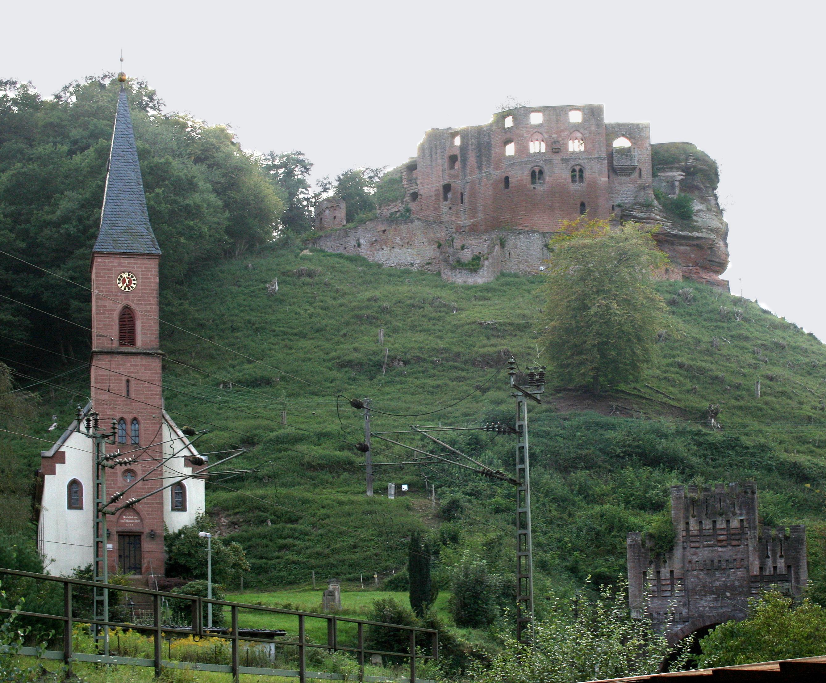 Tunnelportal mit Blick auf Ruine Frankenstein und Kirche